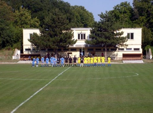 Стадион Левски